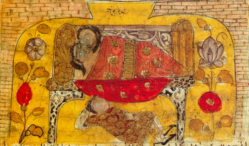 Плотник Сарандиб, его неверная жена и её любовник. «Калила и Димна» Наср Аллаха. Шираз. 1333 г. Британский музей, Лондон The foolish "carpenter of Sarandib", under the bed on which lie his wife and her lover. She notices his foot and contrives a story to prove her innocence. [1]